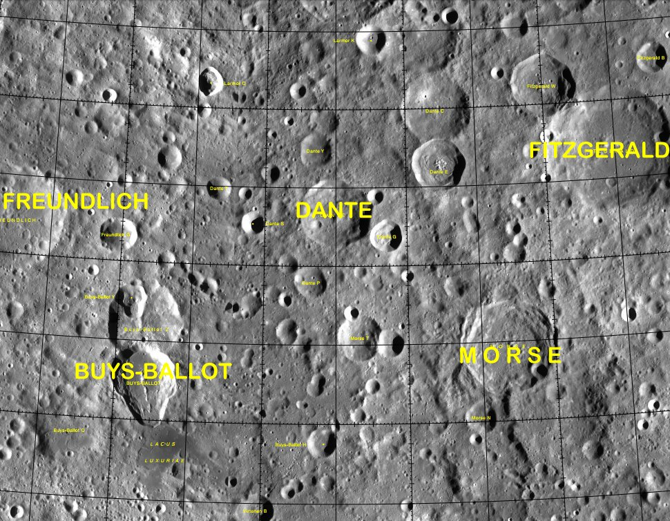 Cráter lunar Dante. Localización (LRO)